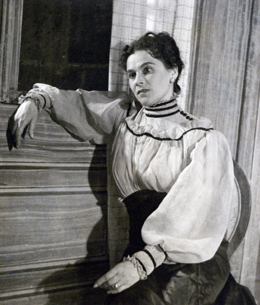 Alojz Kraigher, Školjka, Drama SNG v Ljubljani. Na fotografiji: Vladoša Simčič (Pepina).